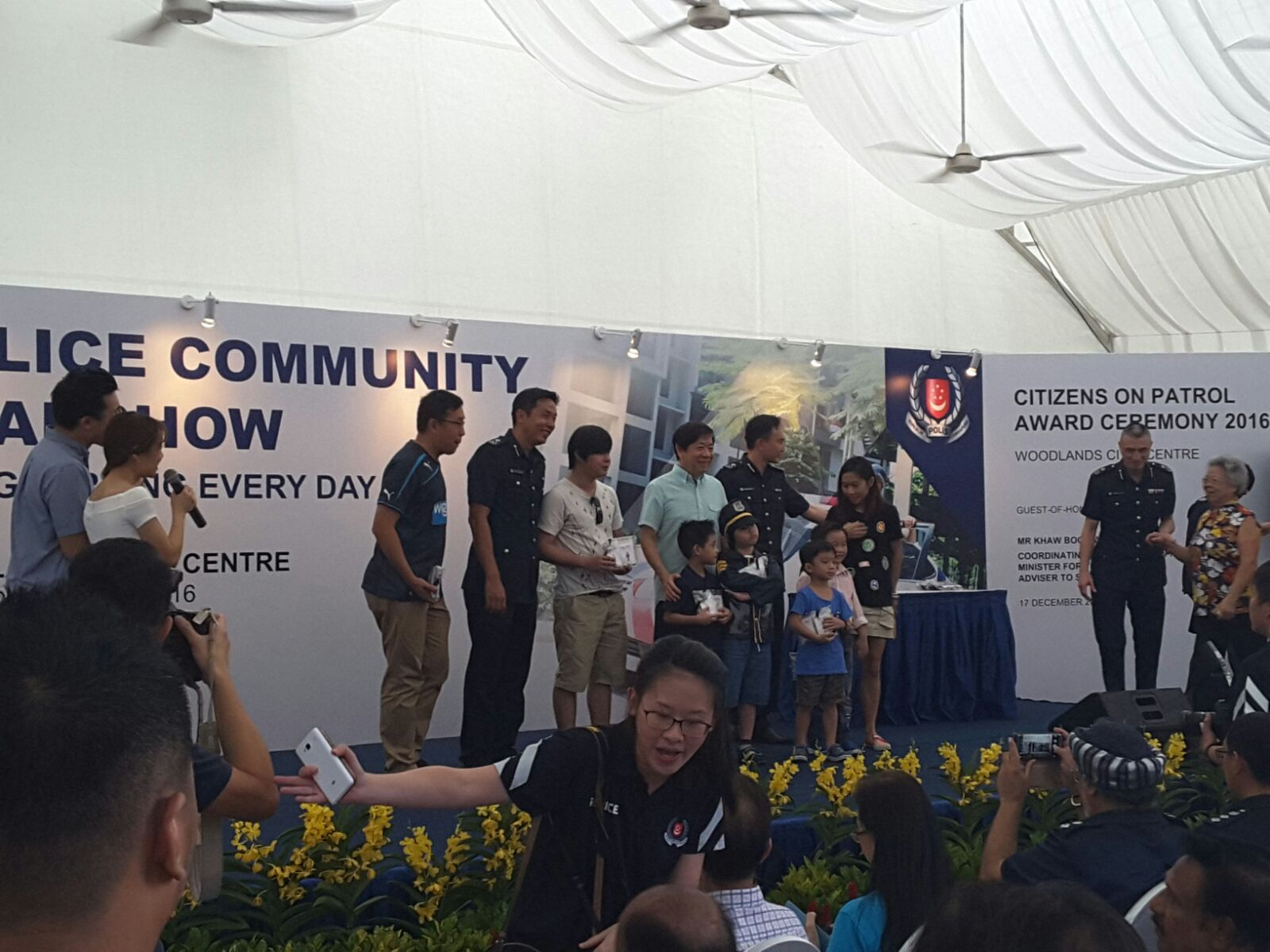 Polis komuniti